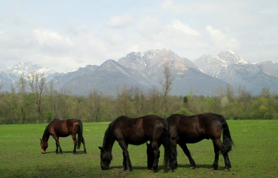 Prato dei cavalli presso la Riserva naturale Vincheto di Celarda, Feltre - Belluno - Italia